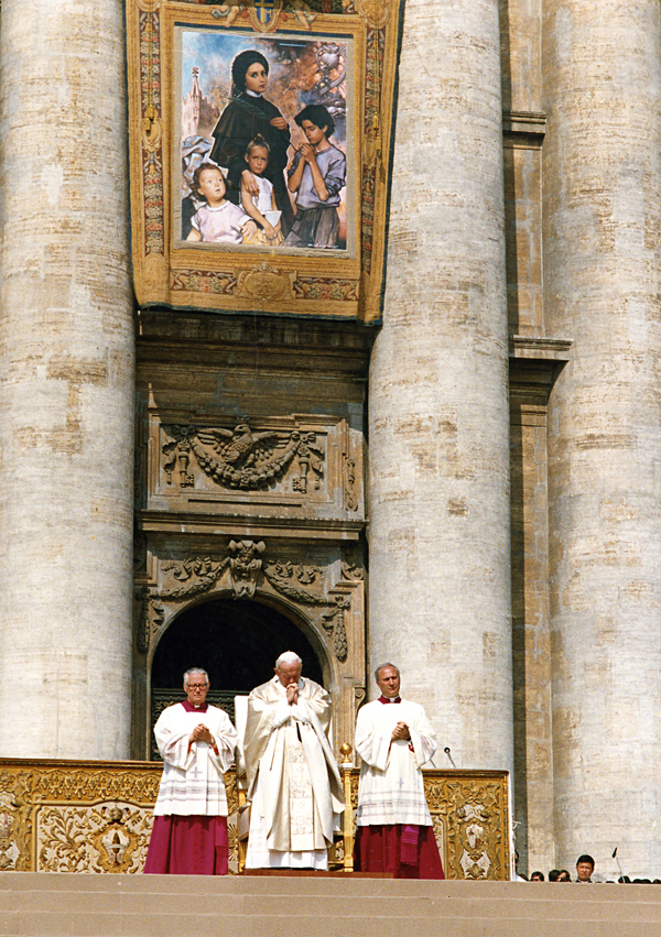 Tela di beatificazione della Beata Mercedes Prat, opera di Giuseppe Antonio Lomuscio, esposta durante la celebrazione tenuta da Papa Giovanni Paolo II